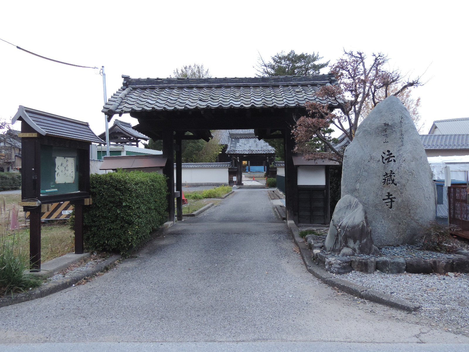 法蔵寺（滋賀県彦根市）。2017年撮影